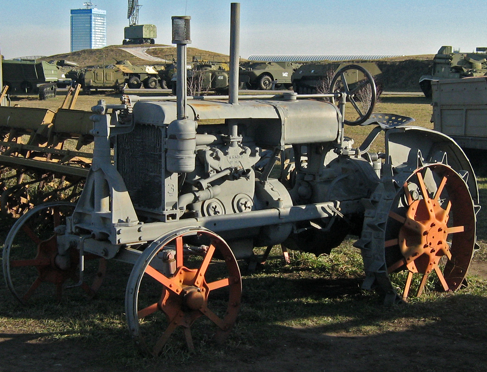 Трактор "Универсал" в музее техники ВАЗа (г. Тольятти)